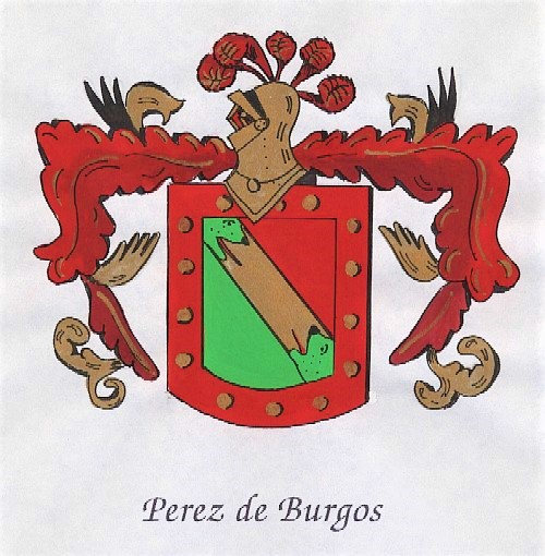 escudo de armas de Pérez de Burgos.